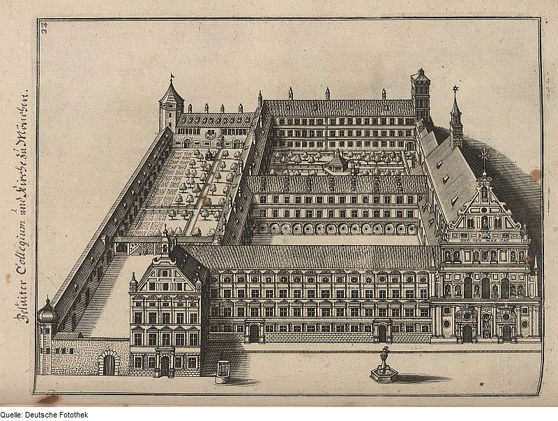 Original image description from the Deutsche FotothekArchitektur & Gebäude